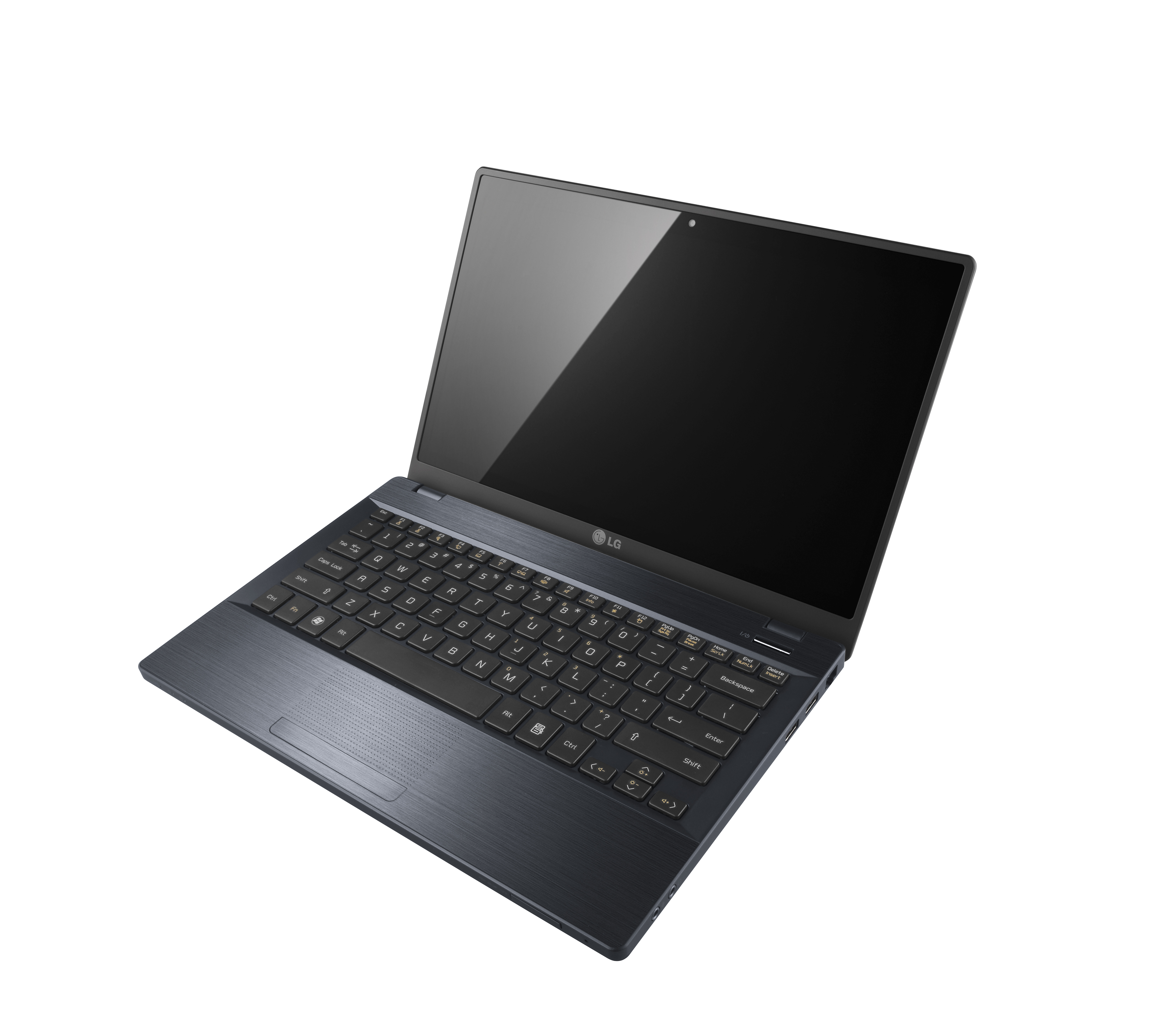 LG전자가 올해 초부터 얇고 가벼운 노트북 시장을 주도해온 ‘블레이드' 시리즈의 13인치 신모델을 출시했다. ※ LG전자 뉴스룸 에서 관련 보도자료를 확인실 수 있습니다.